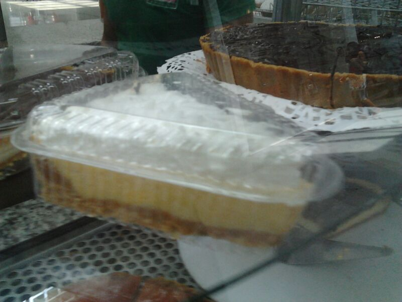 Bienmesabe casero